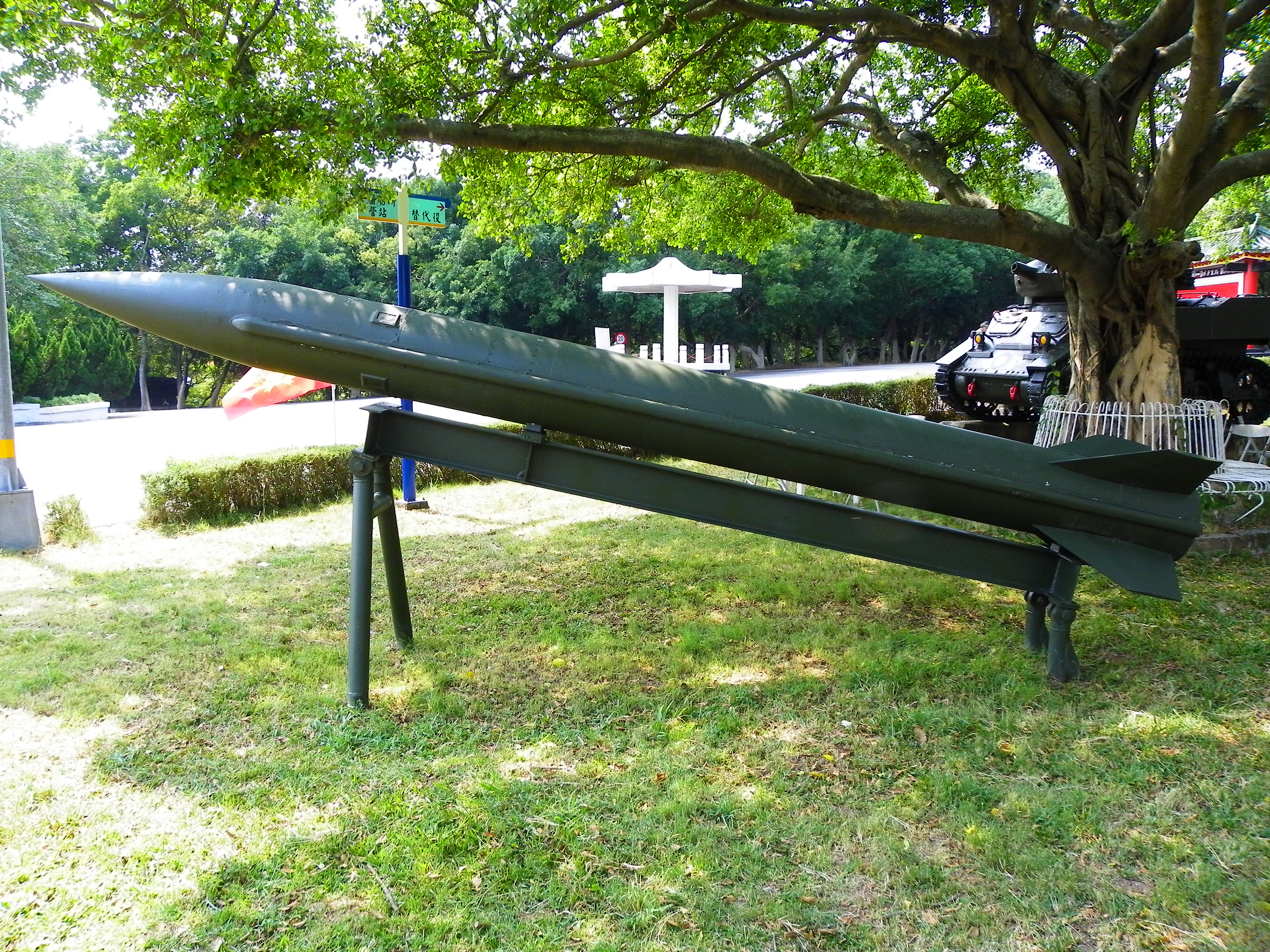 成功嶺營區國軍188營站外展示的天弓一型地對空飛彈，原置於三軍大學率真營區，1997年8月經檢修後移設於此。樹後是M8自走砲。